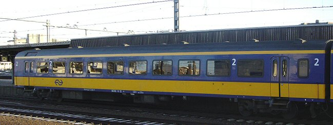 Intercityrijtuig station Utrecht Centraal. Eigen foto Mark Voorendt, december 2004.